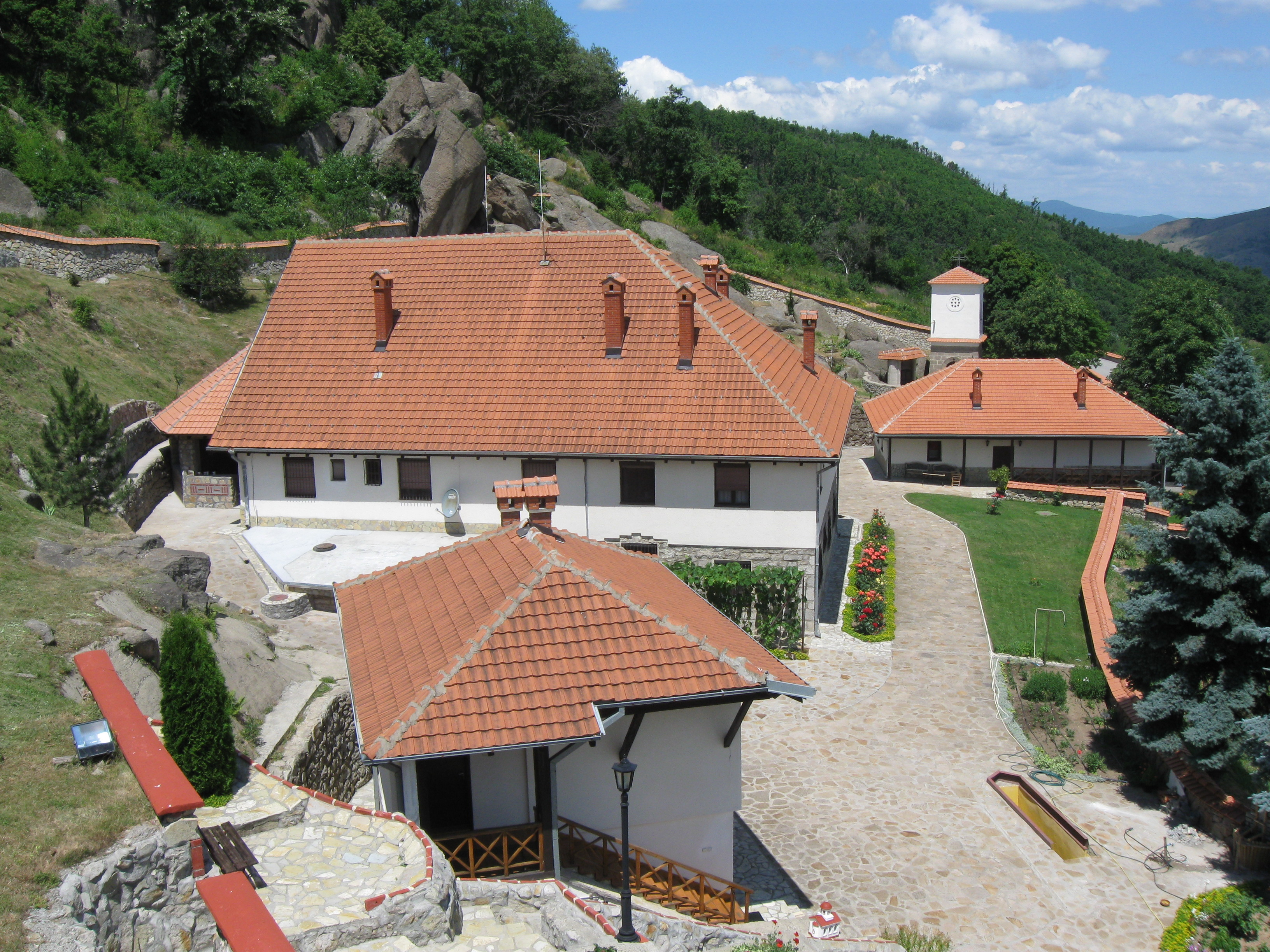 Snimak Radosava Stojanovica